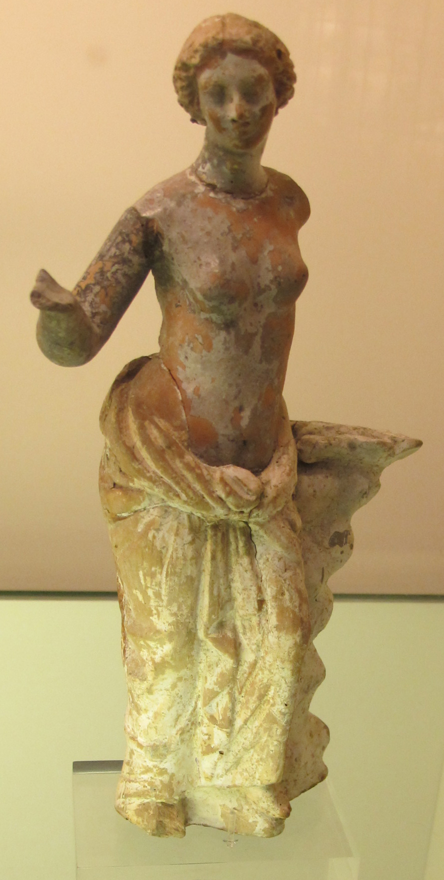 Centuripe, statuetta forse di afrodite, 200-100 ac. ca.